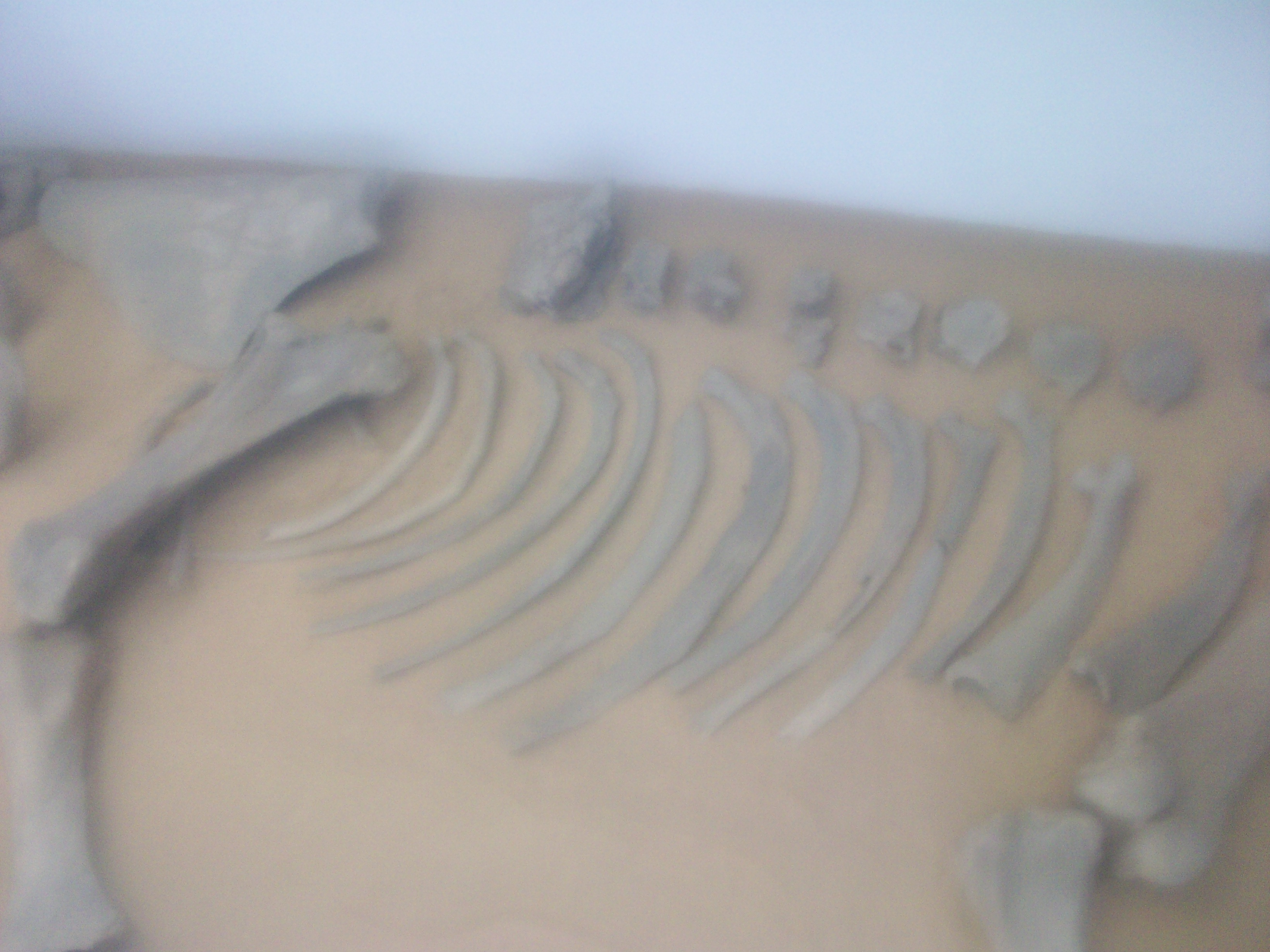 Restos de mamut en la estacion Talisman